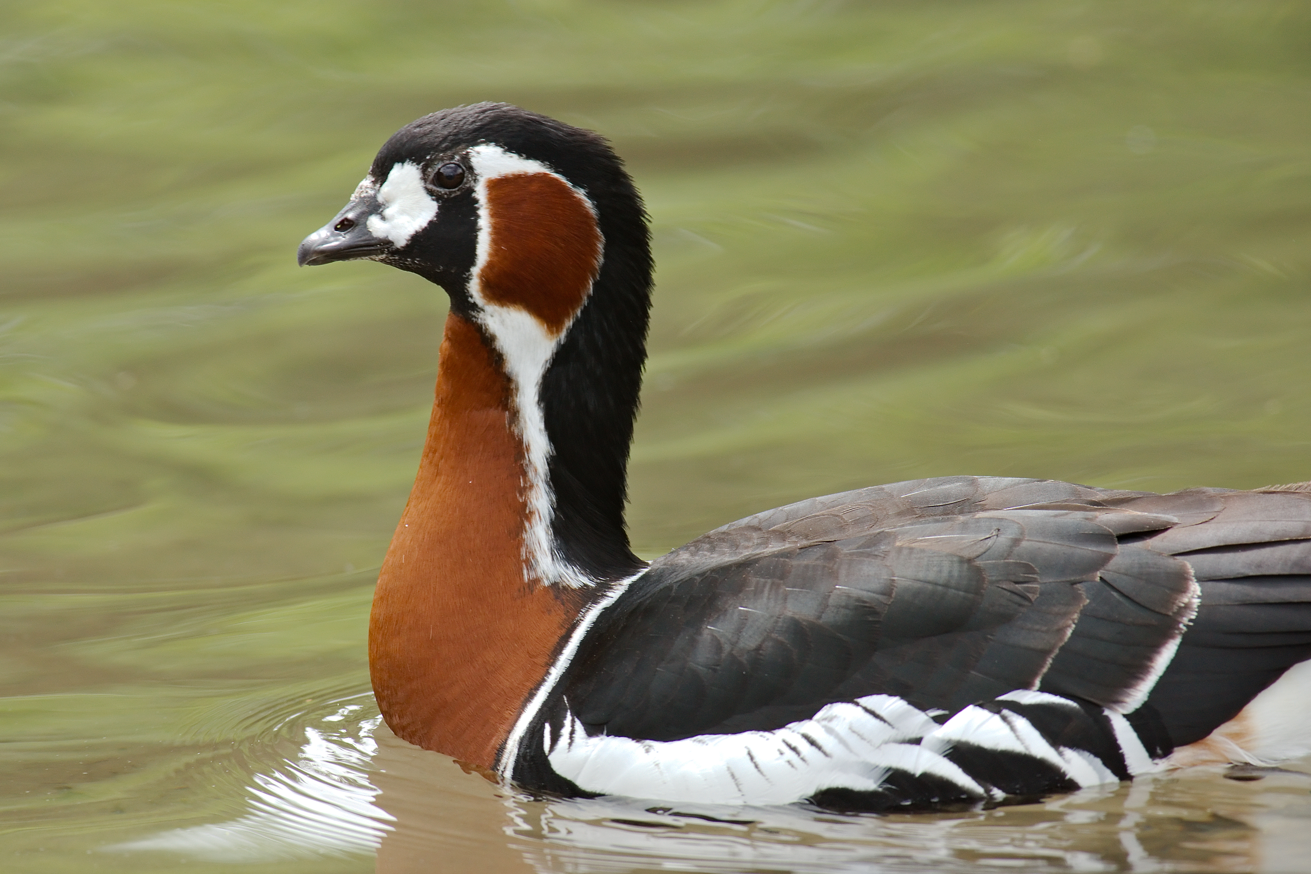 Branta ruficollis dans le parc de Clères